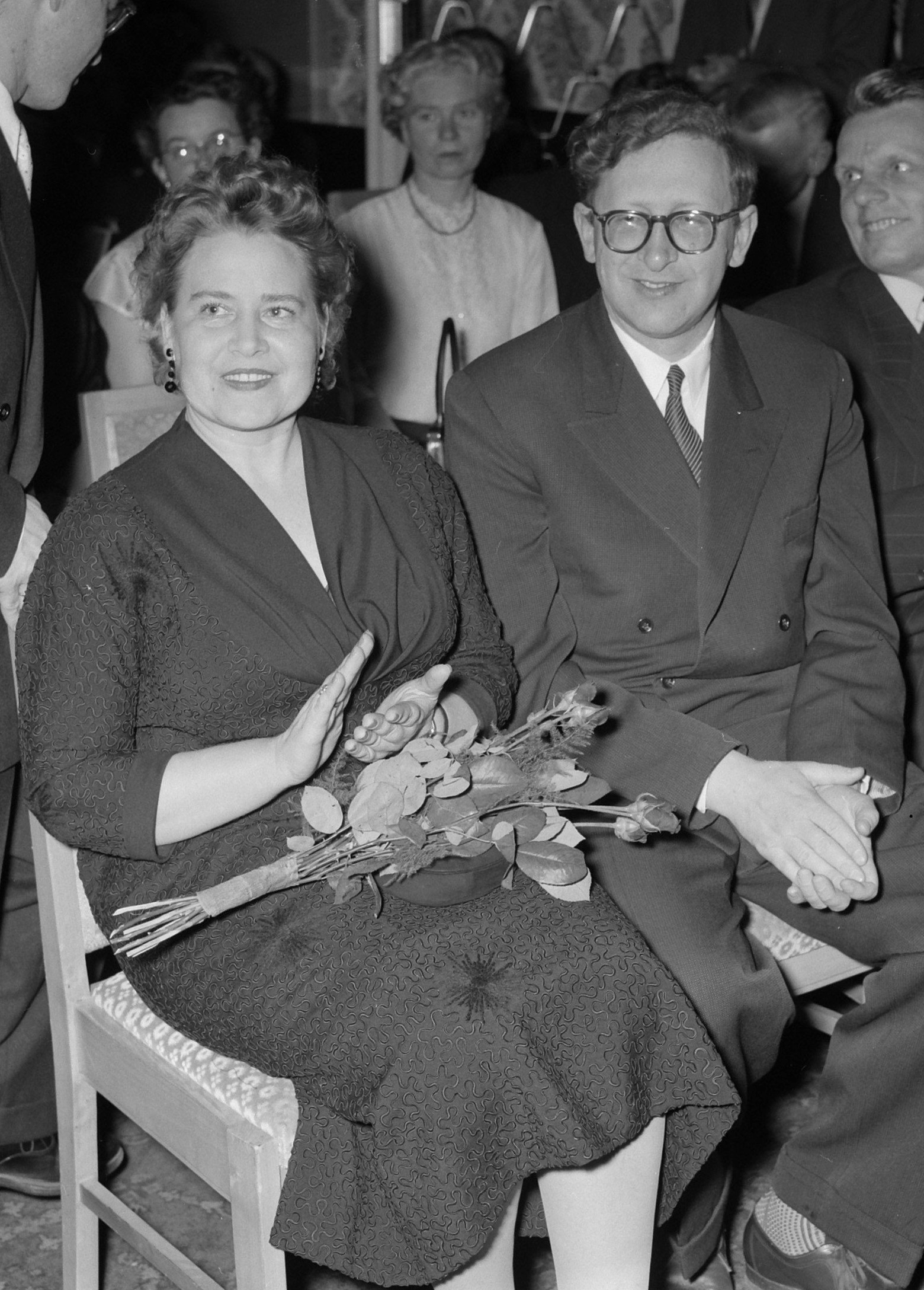 Collectie / Archief : Fotocollectie Anefo Reportage / Serie : [ onbekend ] Beschrijving : Prijsuitreiking Schaken. Kandidatentoernooi. Winnaar Smyslov met vrouw Nadezhda Andreevna Datum : 1 mei 1956 Trefwoorden : Prijsuitreikingen, SCHAKEN, Winnaars Fotograaf : Noske, J.D. / Anefo Auteursrechthebbende : Nationaal Archief Materiaalsoort : Negatief (zwart/wit) Nummer archiefinventaris : bekijk toegang 2.24.01.04 Bestanddeelnummer : 907-7318